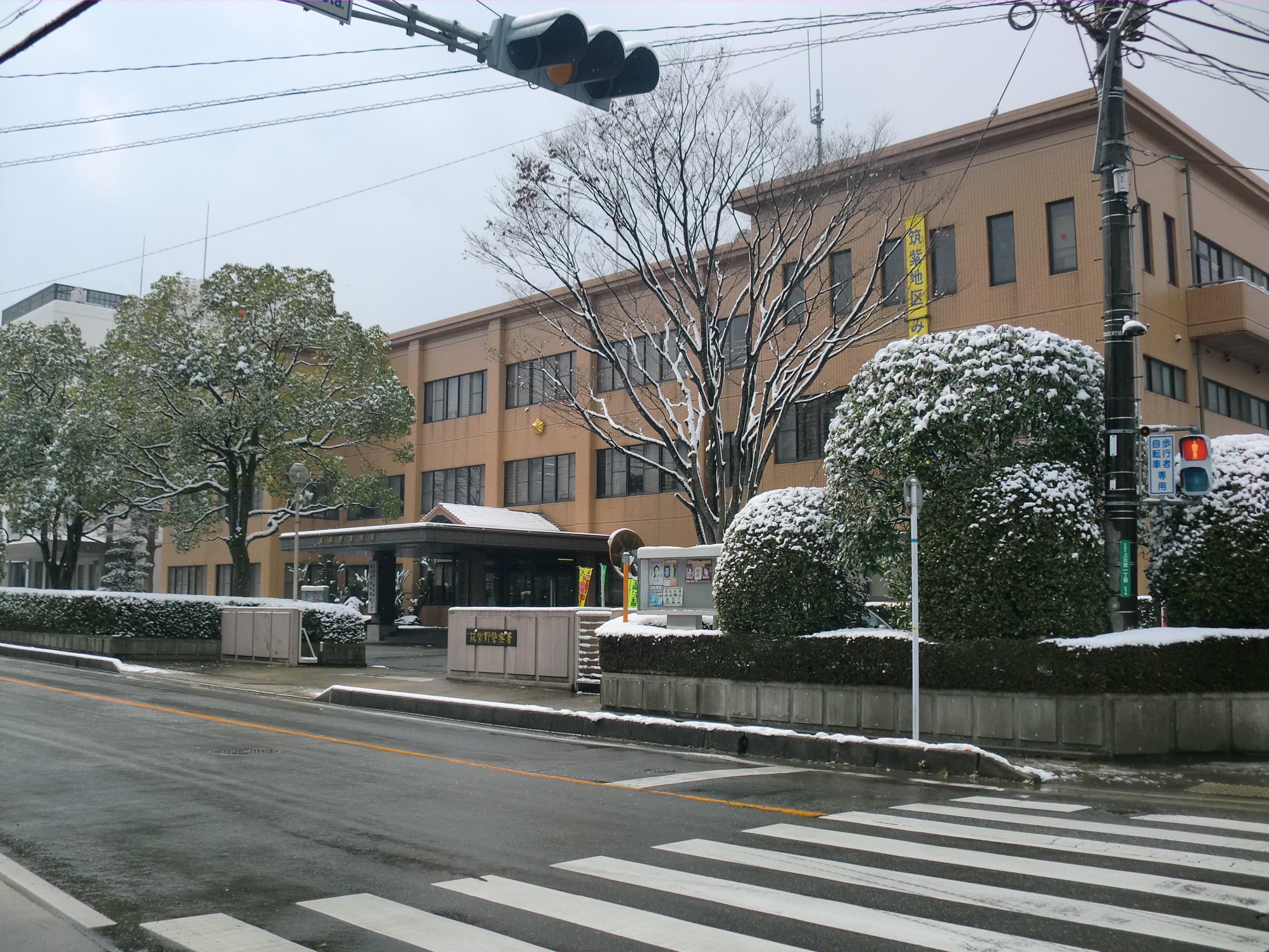 福岡県筑紫野市にある筑紫野（ちくしの）警察署